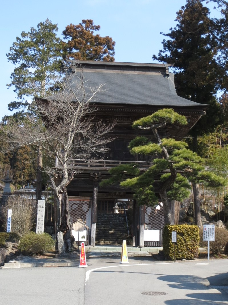 一関市にある宝持院山門 Canon IXY 3